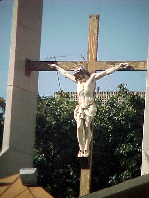 Maiquetia en el estado Vargas - Venezuela a un año de del deslave de diciembre de 1999 (2000)